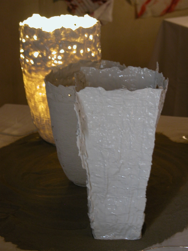 Foto mia personale, vasi e lampada in paper clay, 2008